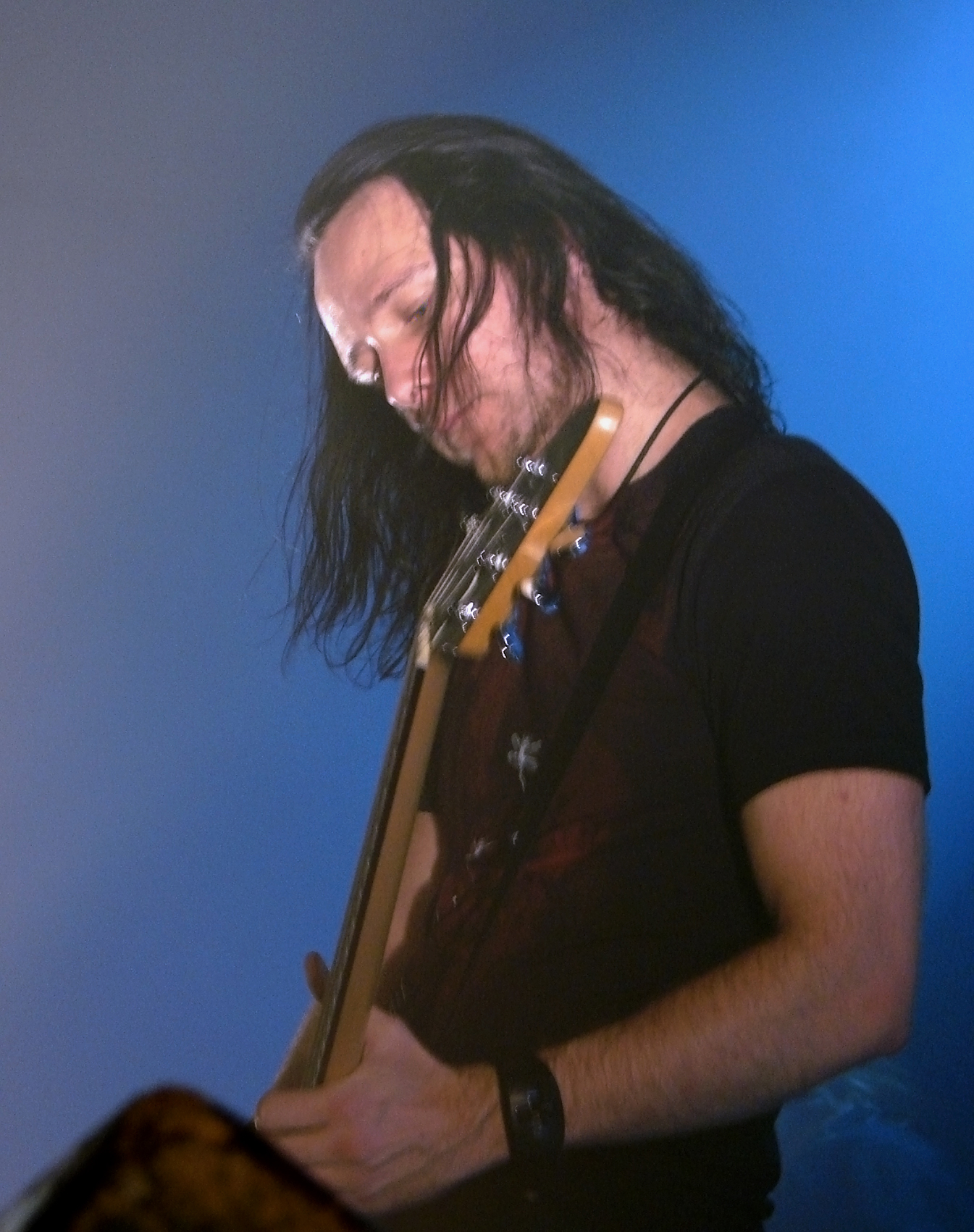 Dark Tanquillity, groupe suédois de Death Metal mélodique, en concert à la Locomotive, à Paris, le 28 Octobre 2008. Niklas Sundin à la guitare.